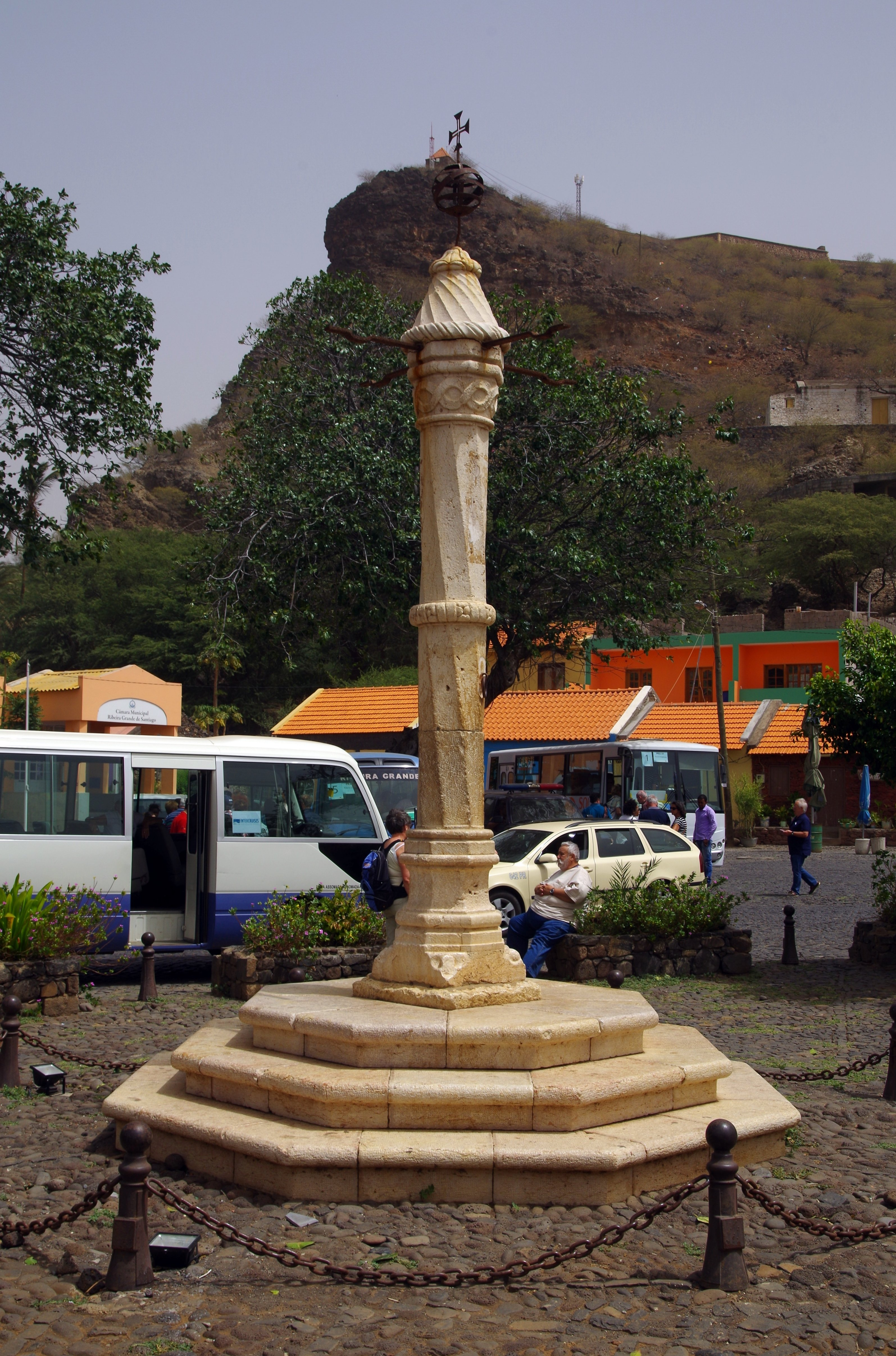 Cidade Velha, Pelhourino